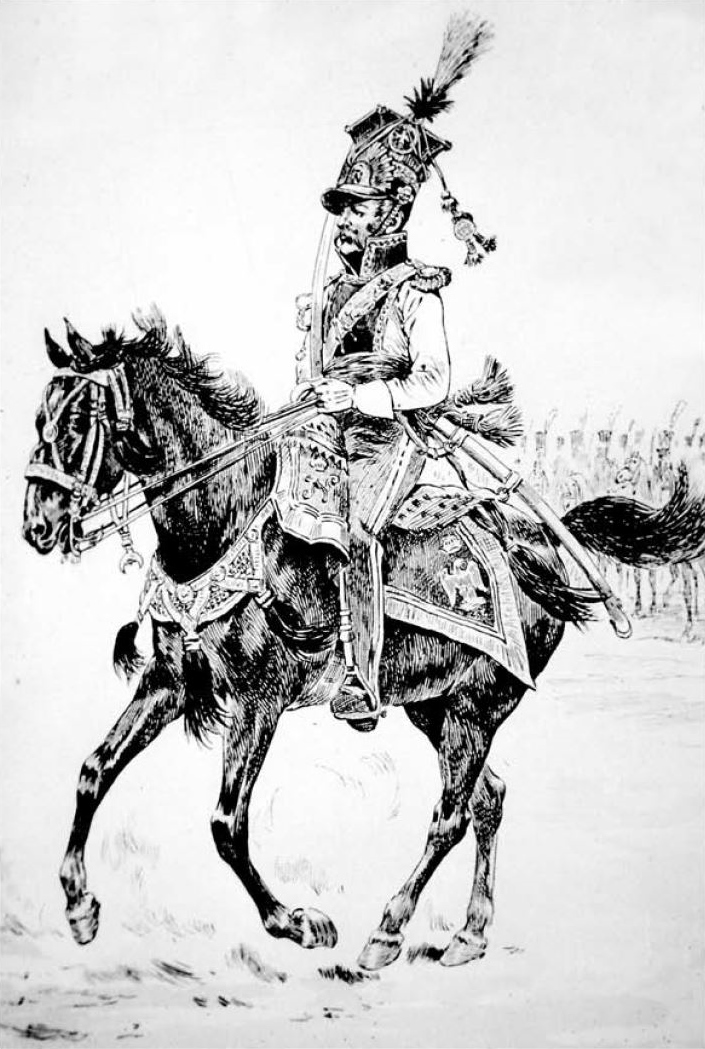 Le colonel Krasinski, commandant le régiment des lanciers polonais de la Garde impériale.